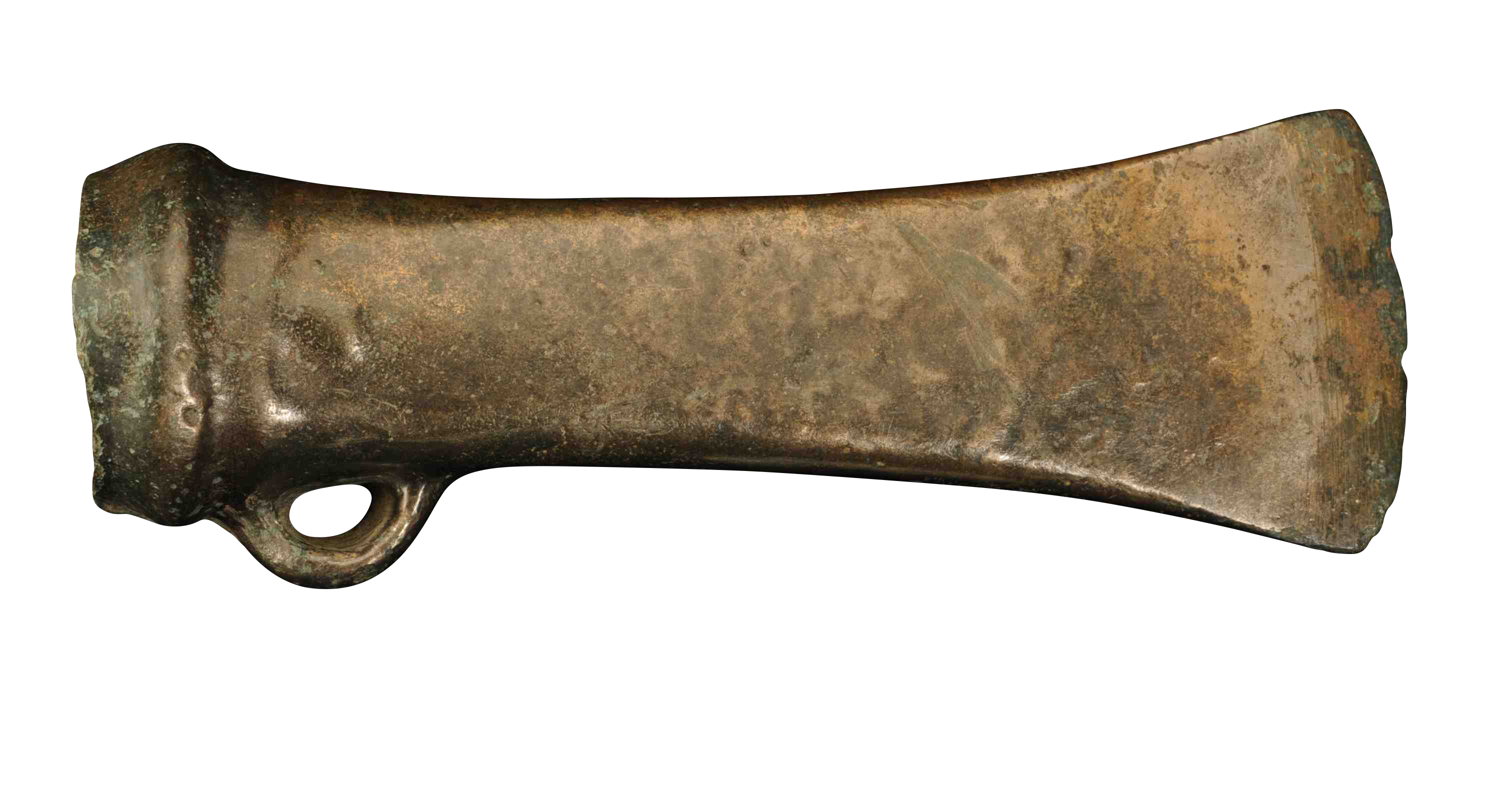 Kokerbijl van het Plainseautype in brons, 925 tot 800 VC, vindplaats: Maaseik, Heppeneert, Wayerveld, collectie Gallo-Romeins Museum Tongeren, He 1